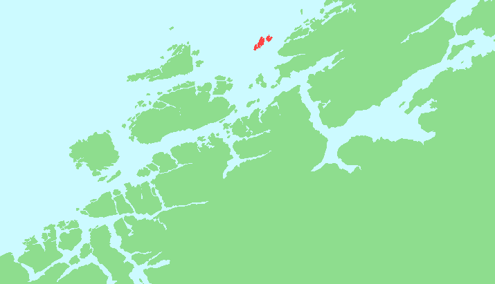 Locator map of Tarva, Sør-Trøndelag, Norway